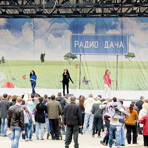 Блестящие выступают на субботнике